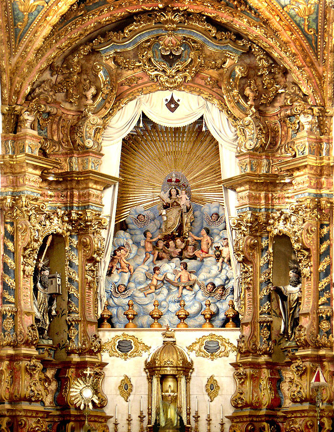 Altar-mor da Basílica de Nossa Senhora do Carmo, Recife, Pernambuco, Brasil.